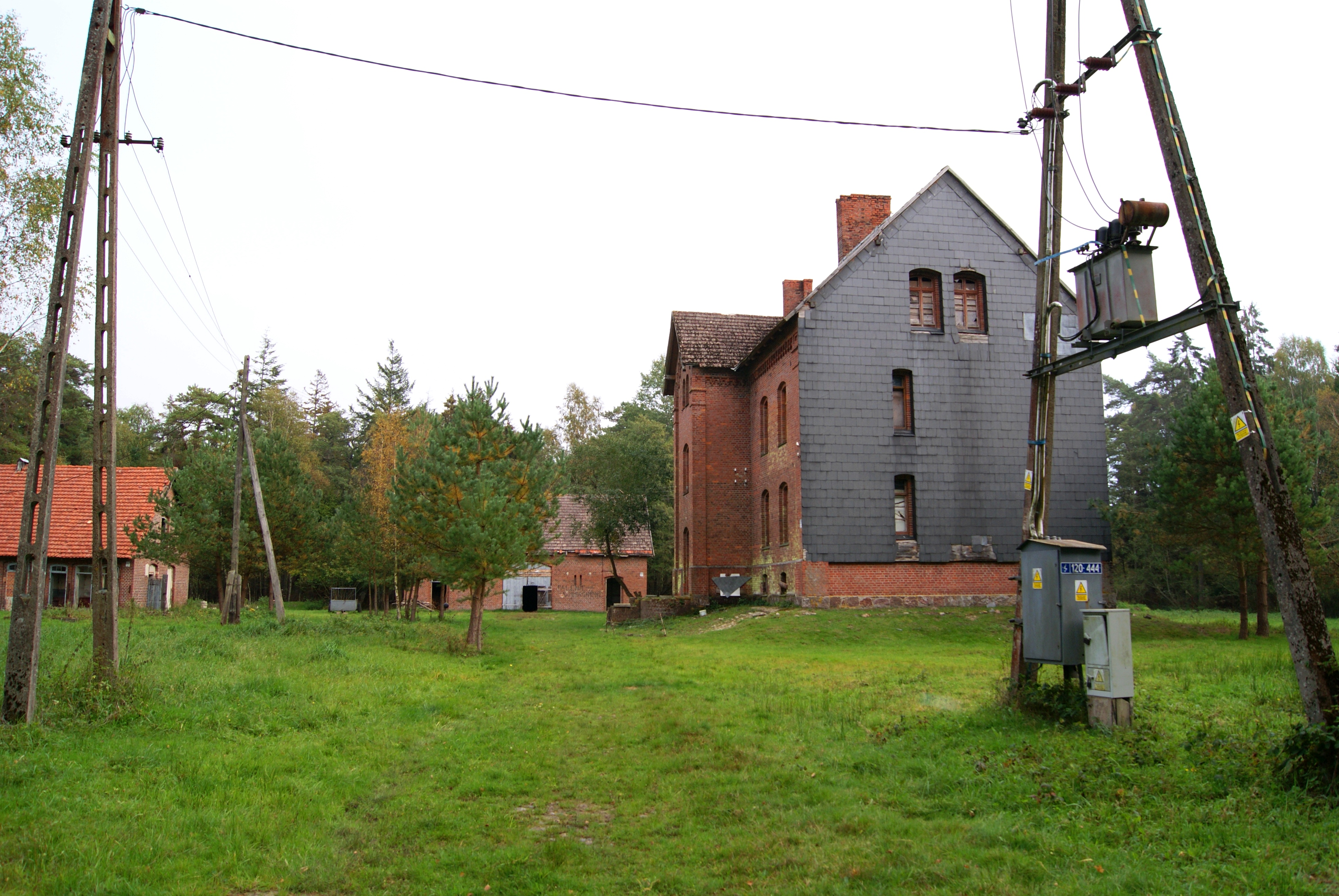 Osadę zaprojektowano w 1871r. Tworzyły ją dwukondygnacyjny, podpiwniczony budynek mieszkalny,stodoła i obora.